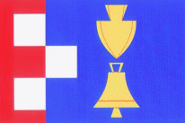 Prapor Chudčic